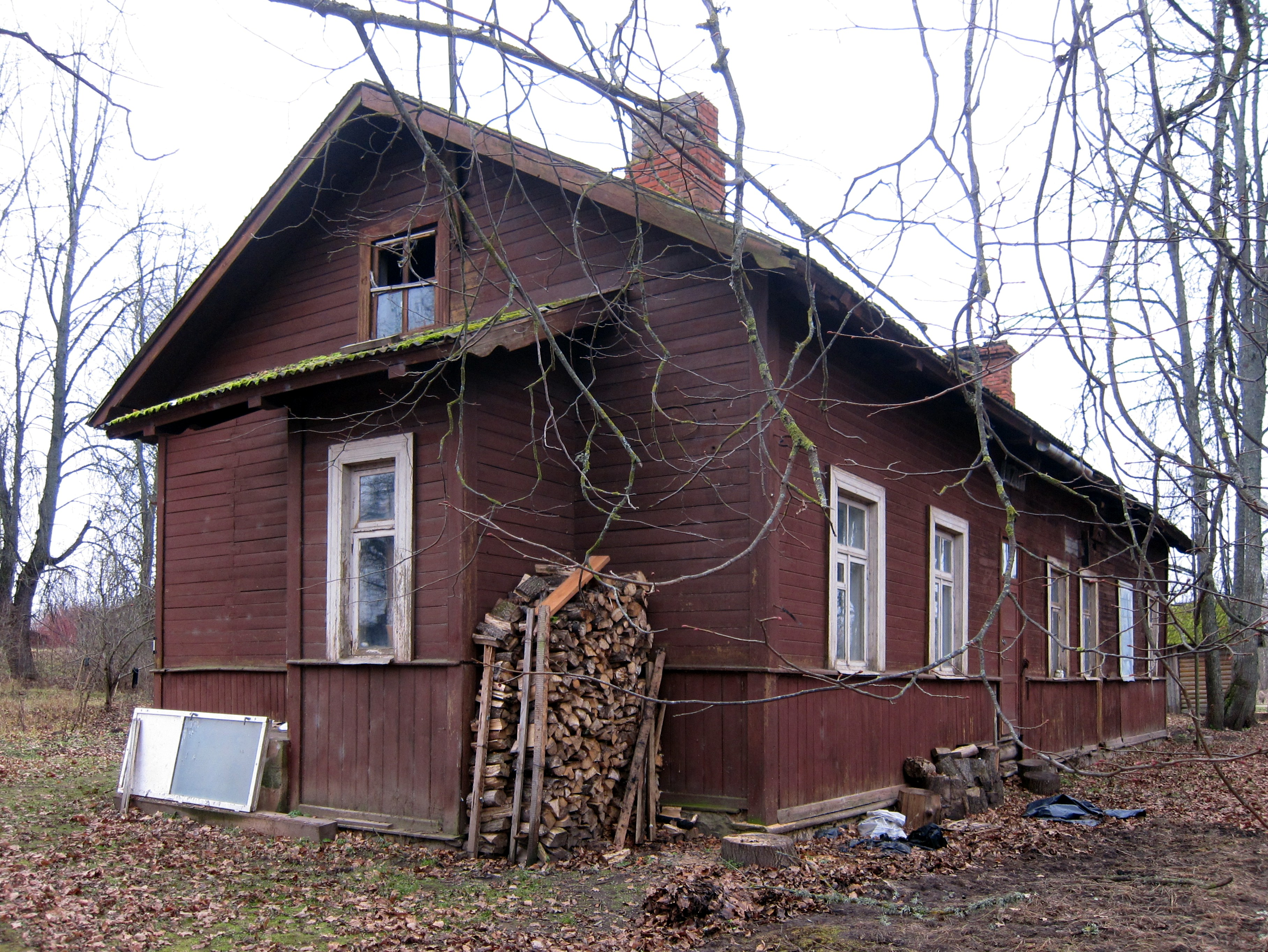 Bijusī Lizuma stacija